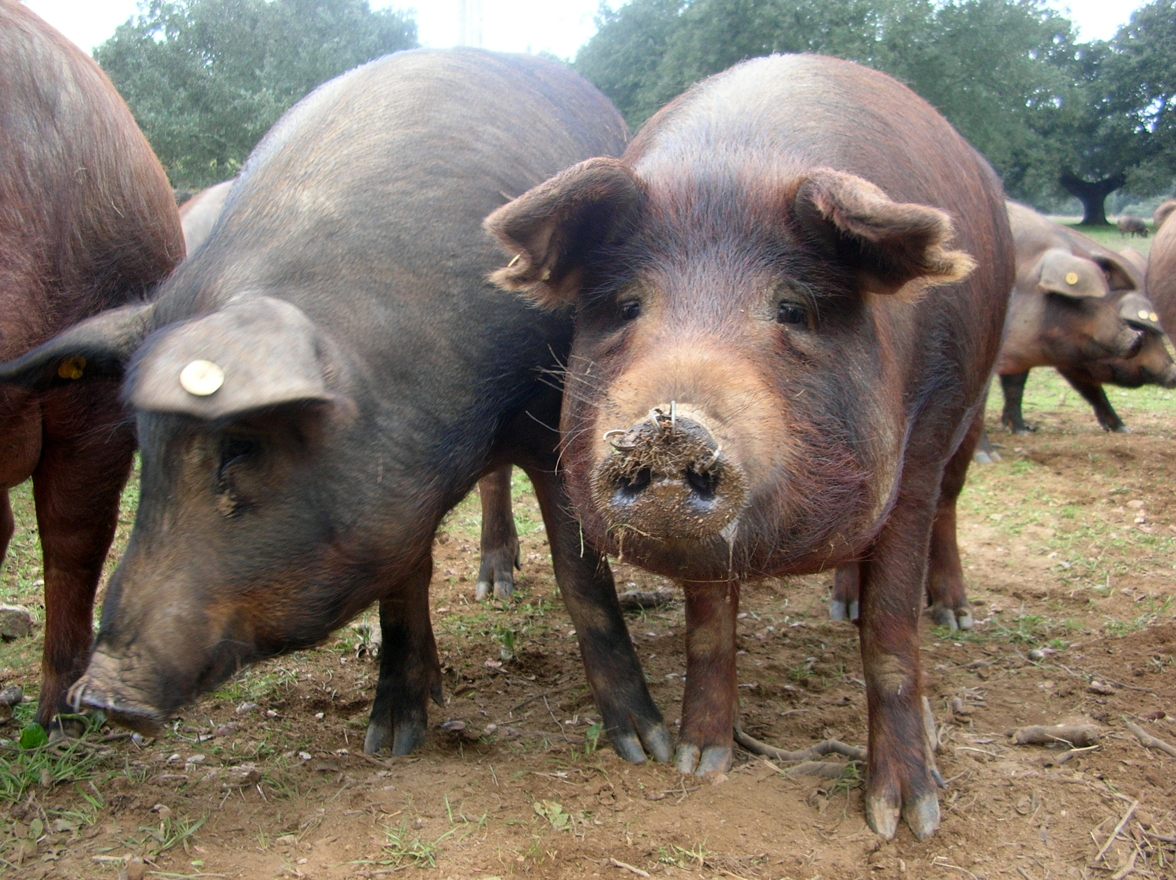 Porc ibérique (cerdo ibérico) dans la sierra nord de Séville (Espagne).